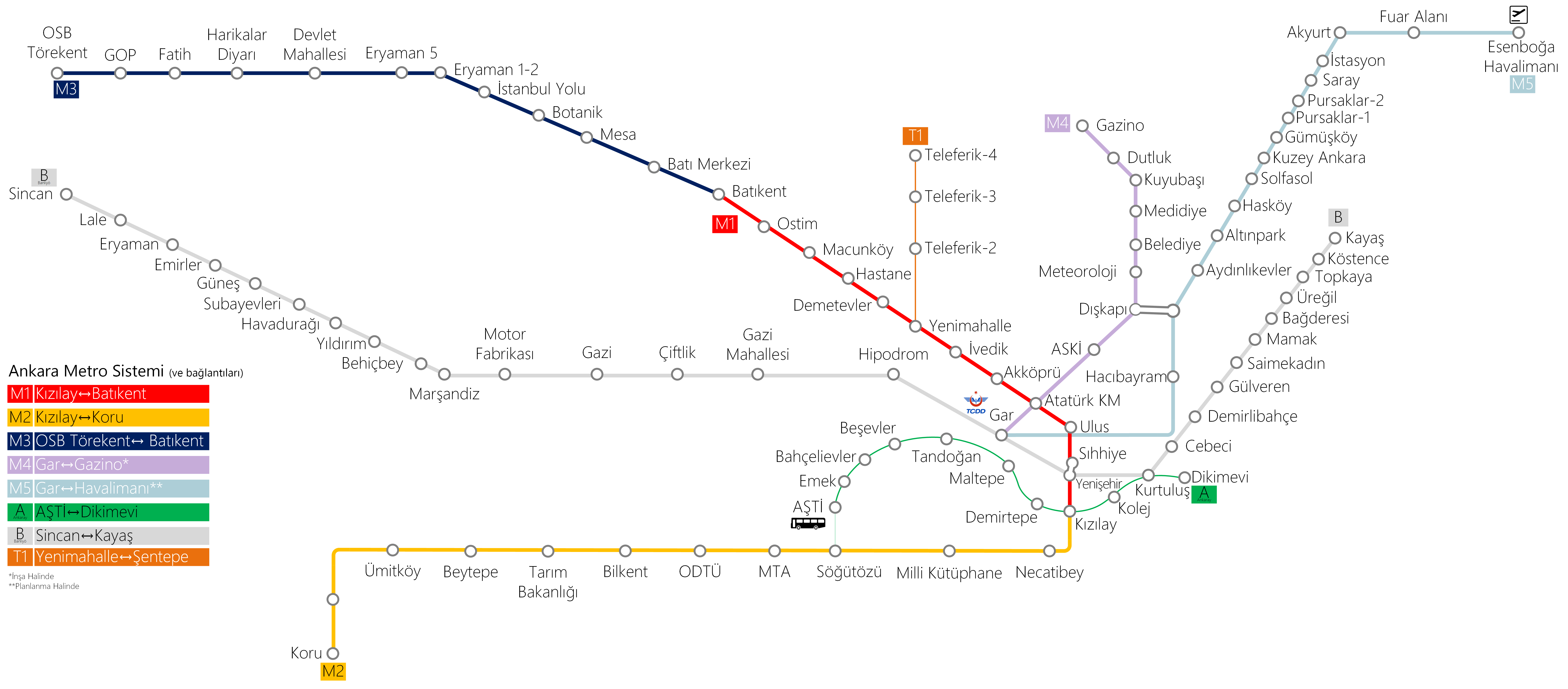 Ankara metrosu planı